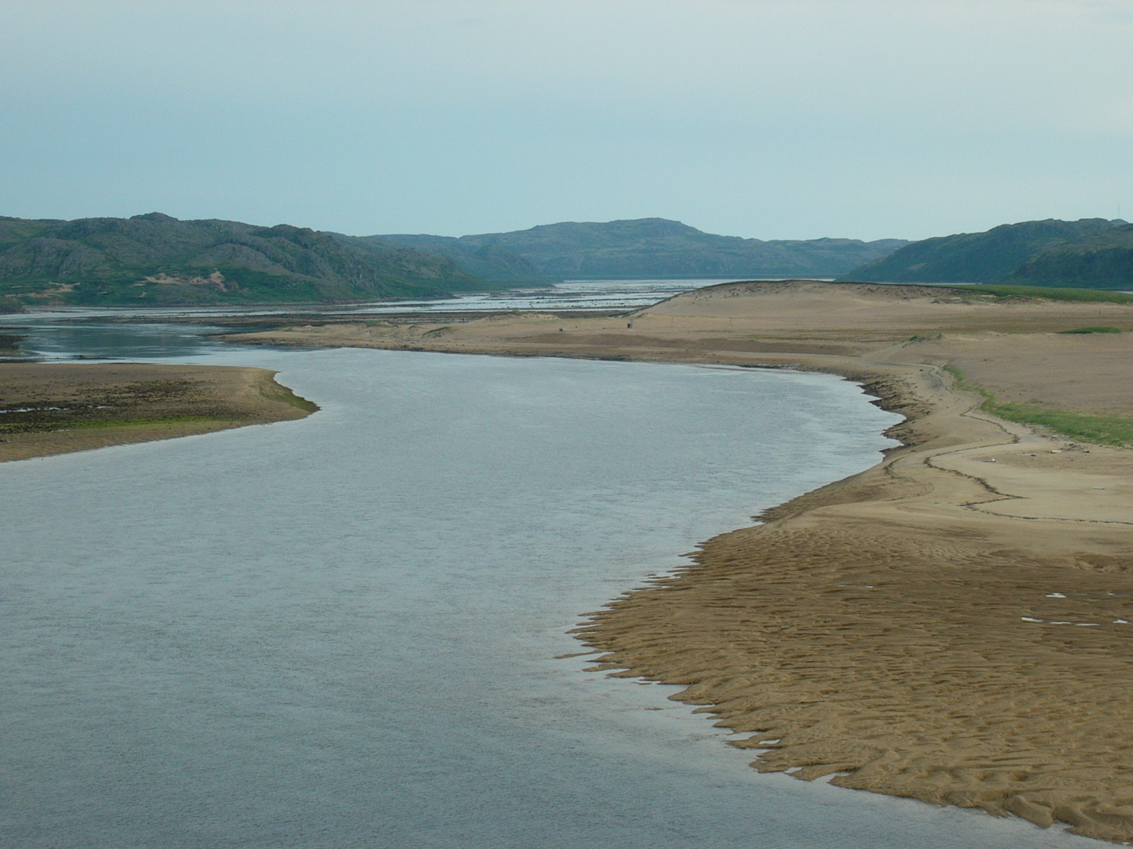 Воронья река (Кольский полуостров), 0,5 км выше устья, вид на юг.